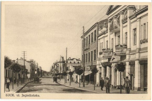 postcard